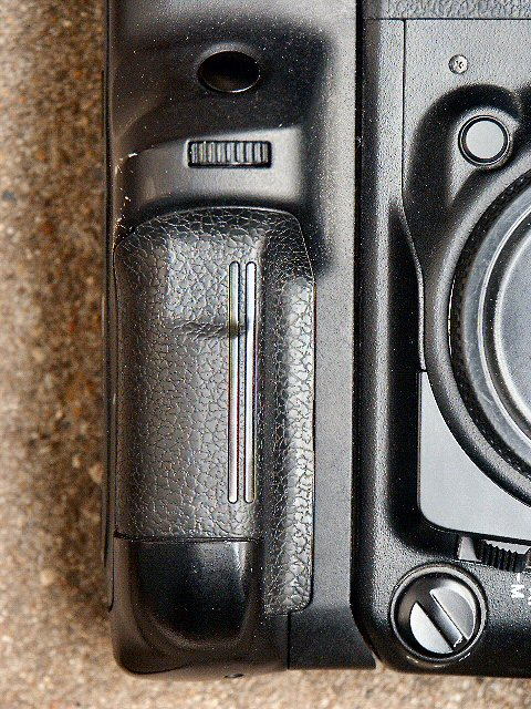 Minolta Dynax 9 - Hochformathandgriff an Funktionshandgriff VC-9 (Fotografiert mit: Minolta Dimage 7 Hi)